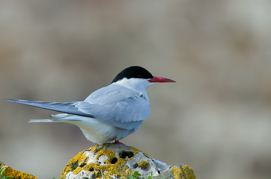 Sterna paradisaea